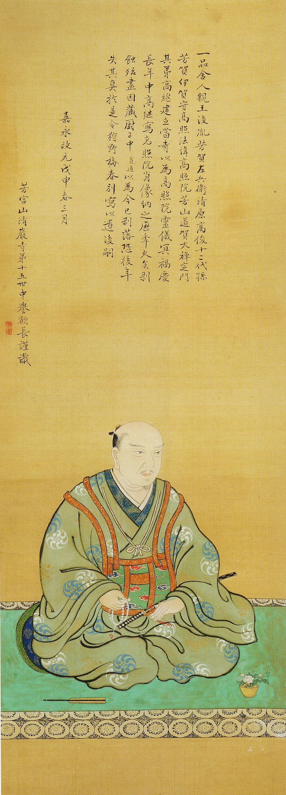 芳賀高照の肖像画。